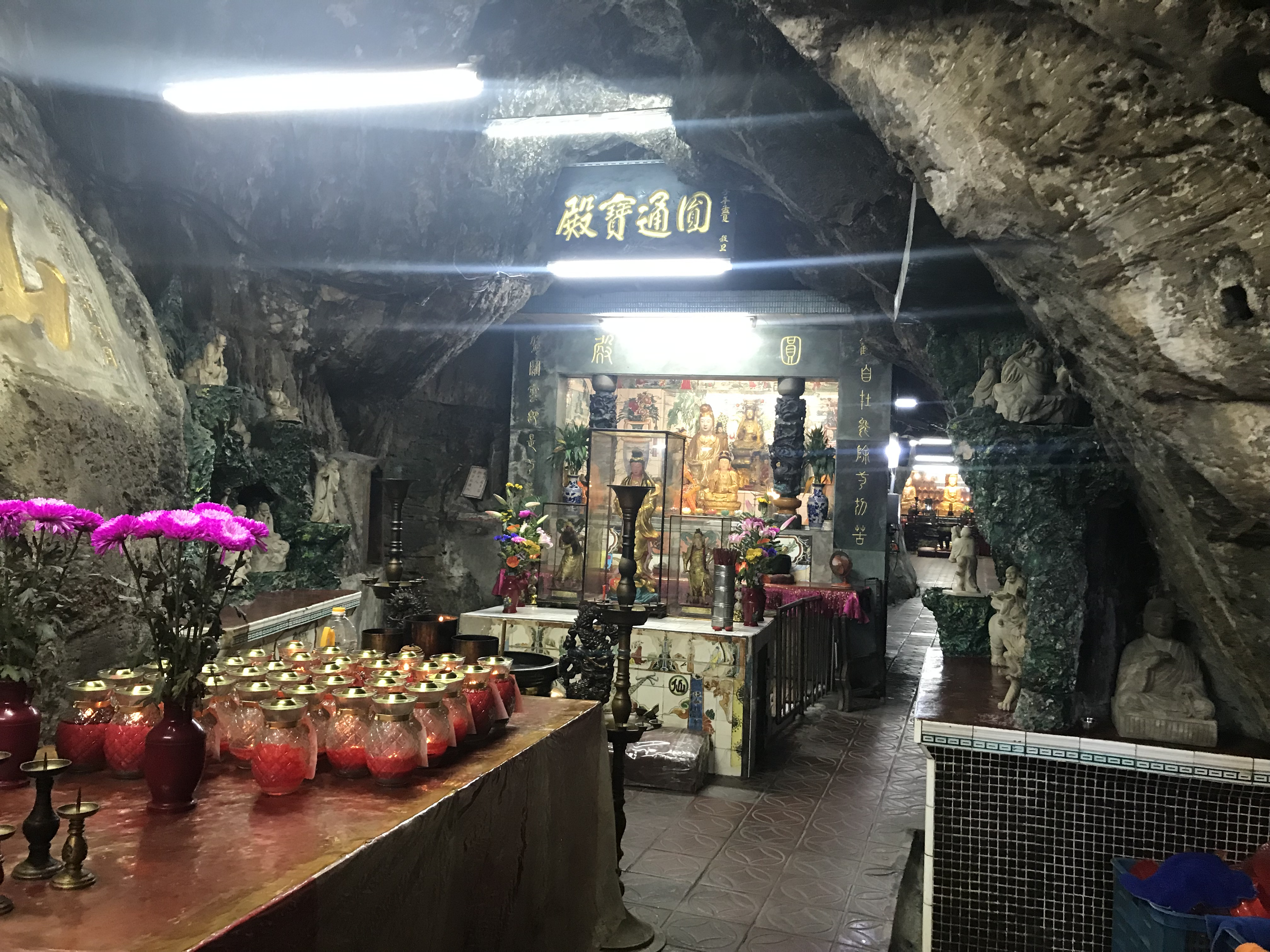 仙洞巖主洞